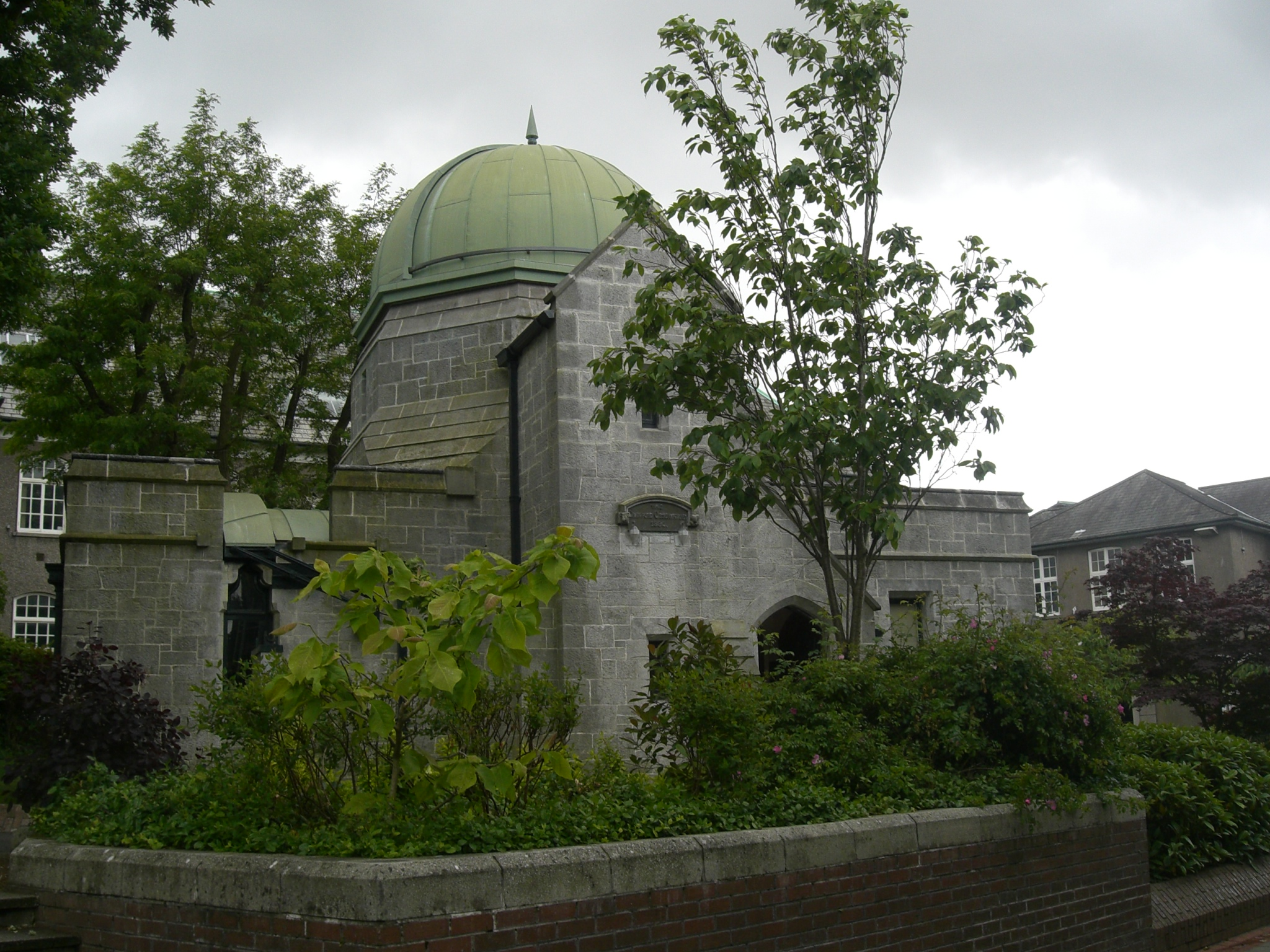 Observatoire astronomique Crawford situé sur le campus de UCC, Cork, Irlande